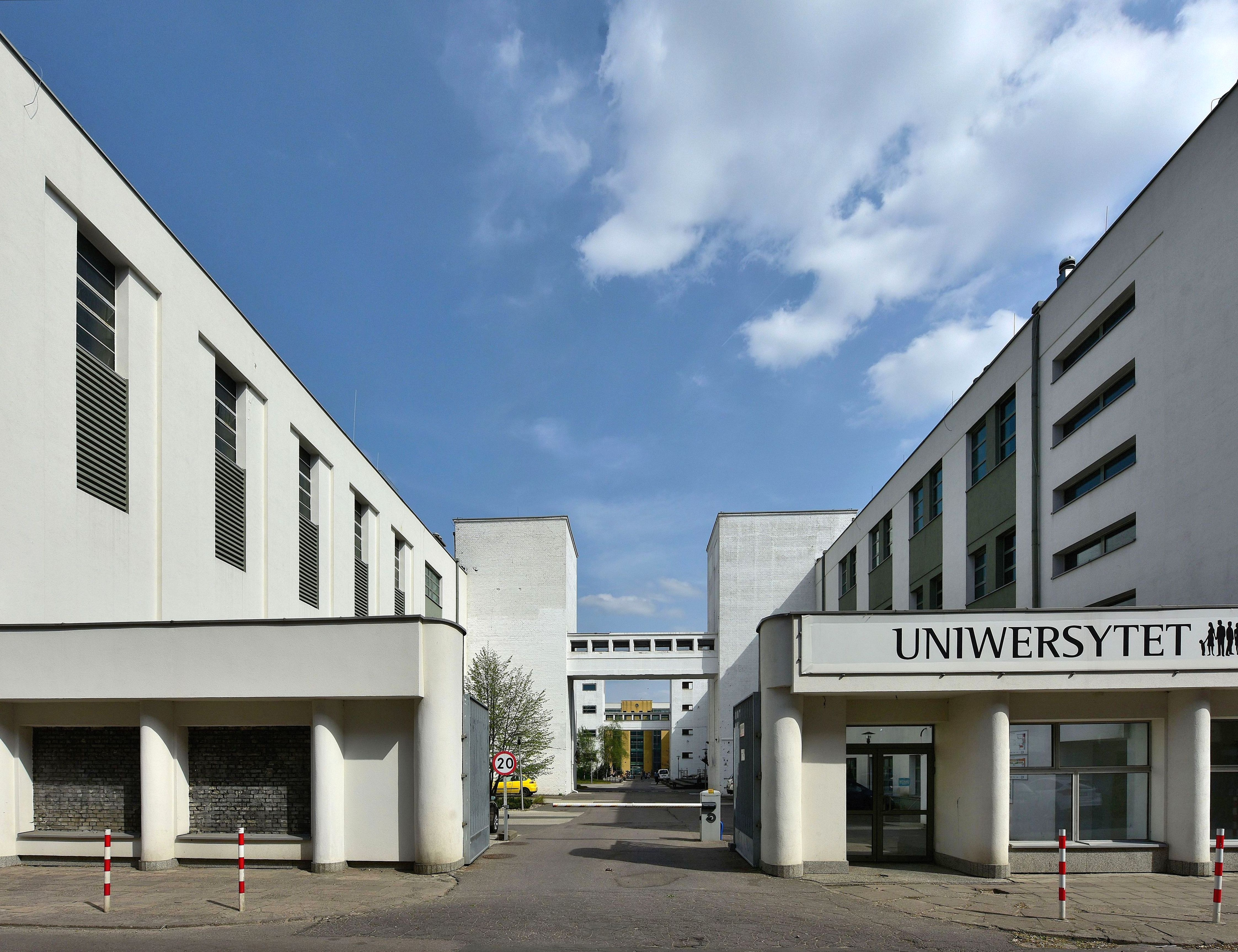 Kompleks Uniwersytetu SWPS w Warszawie od strony ul. Gocławskiej